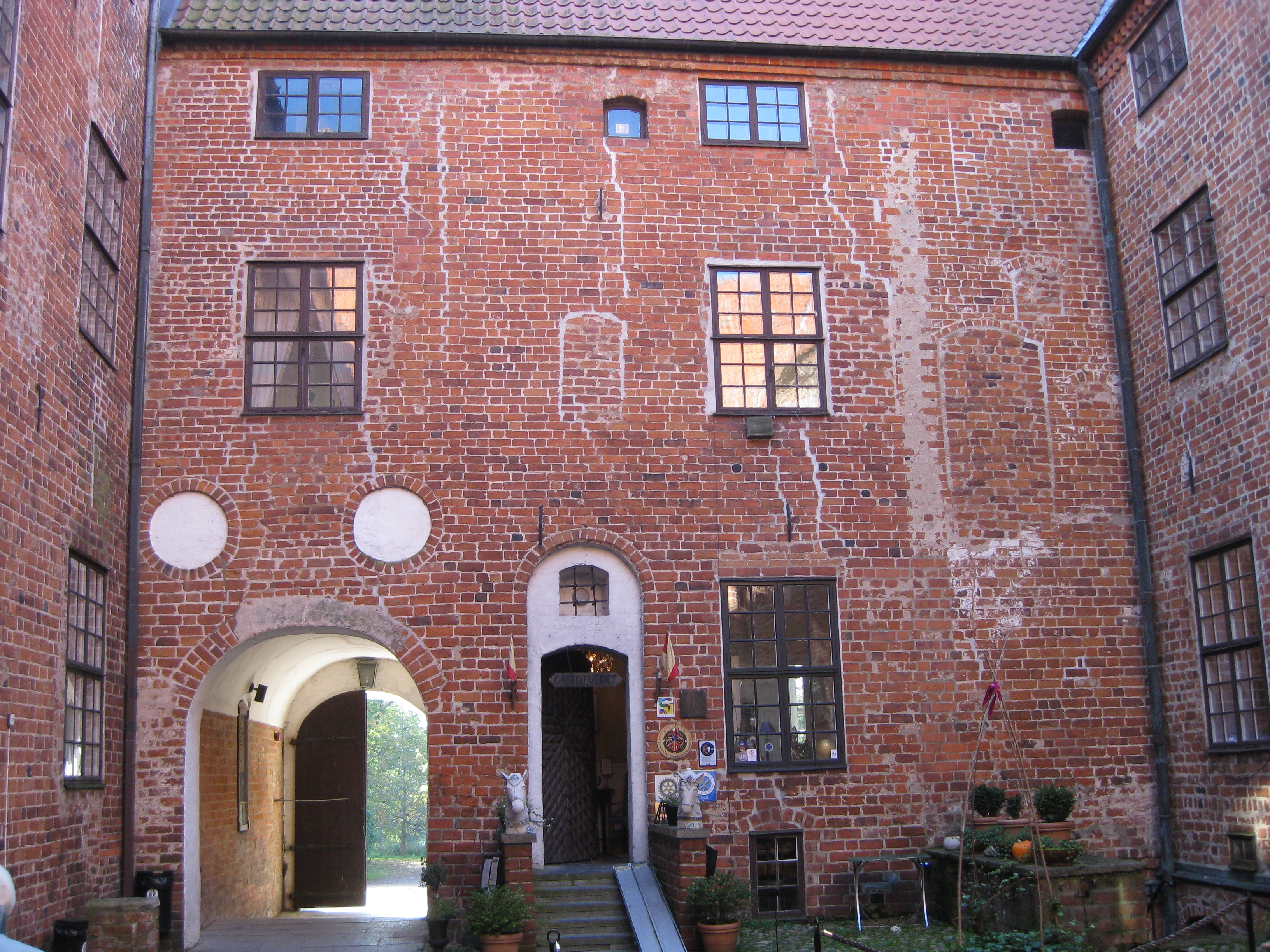 Innergården på Svaneholms slott i Skåne